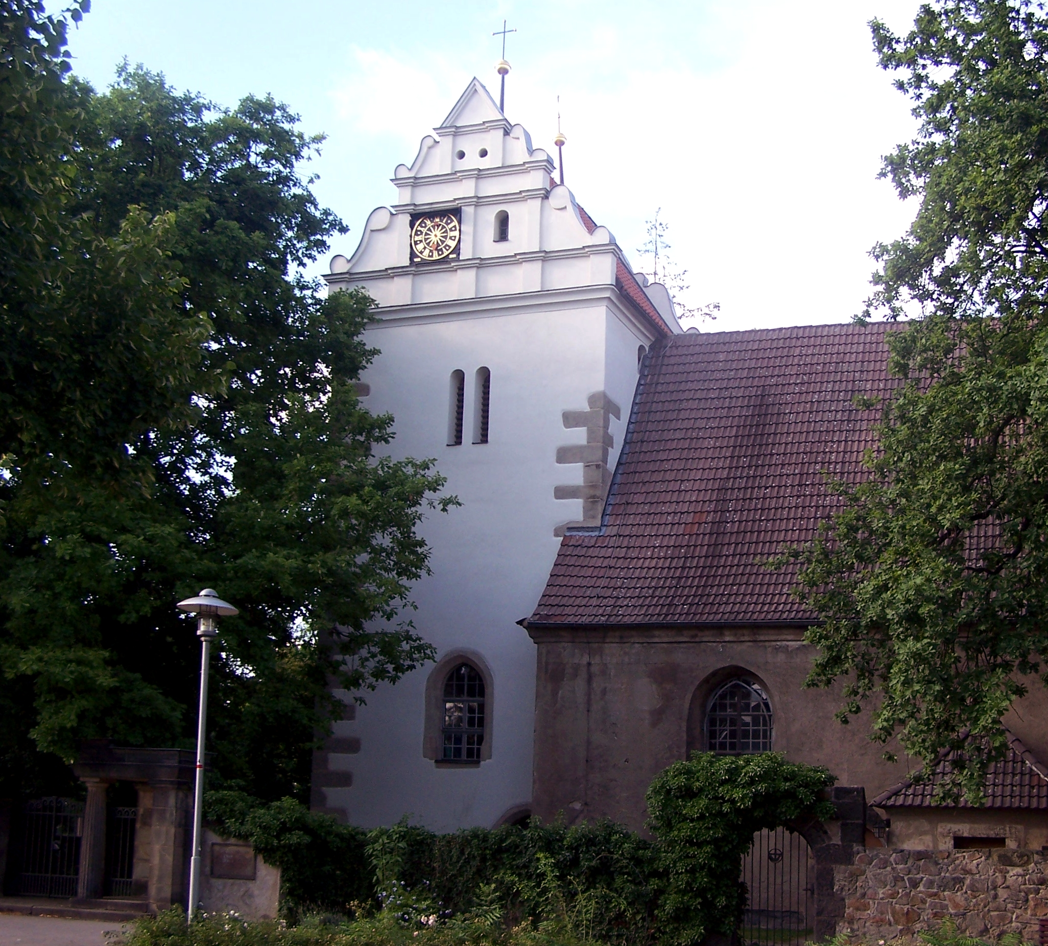 Alte Kirche in Coswig, Landkreis Meißen, Sachsen